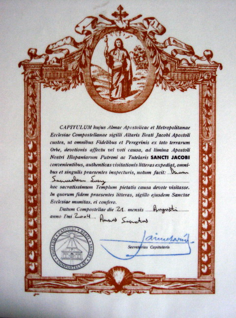 Compostela